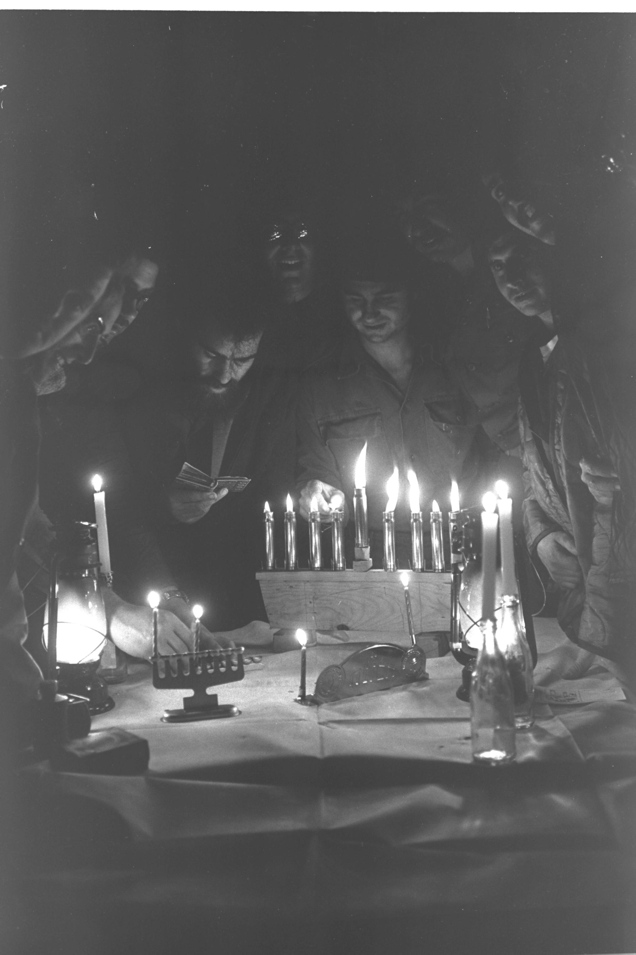 Yom Kippur war. soldiers lighting the Hanuka candles at their tent in the West Bank of the canal (23/12/1973). מלחמת יום הכיפורים. חיילים מדליקים נרות חנוכה באהלם, בגדה המערבית Photo: GPO.